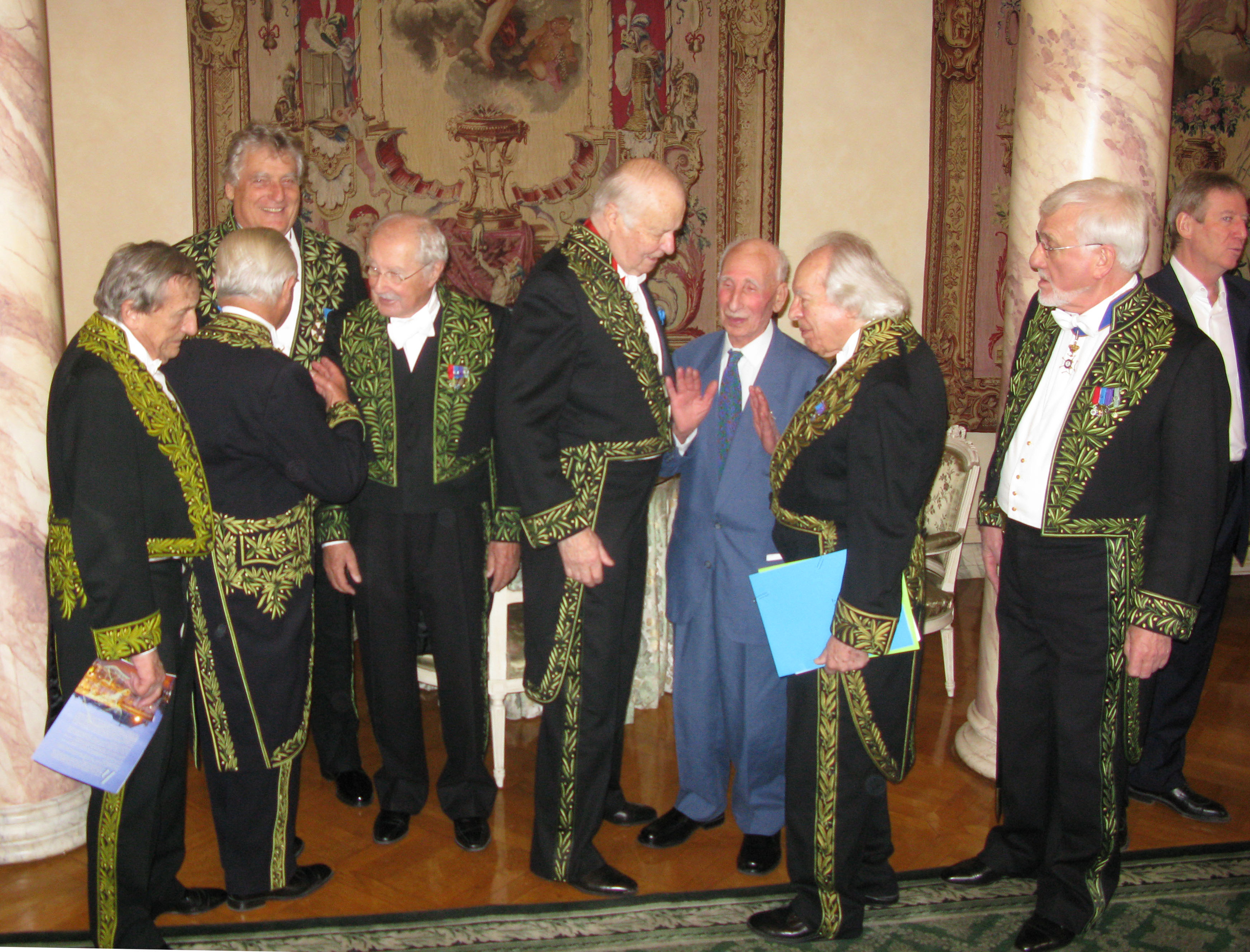 Marino di Teana reçu à L'Académie des Beaux-Arts. Avec Arnaud d'Hauterives, secrétaire Perpétuel, Antoine Poncet, Président, Leonardo Gianadda, President de la Fondation Pierre Gianadda, Jean Cardot, Yves Boiret